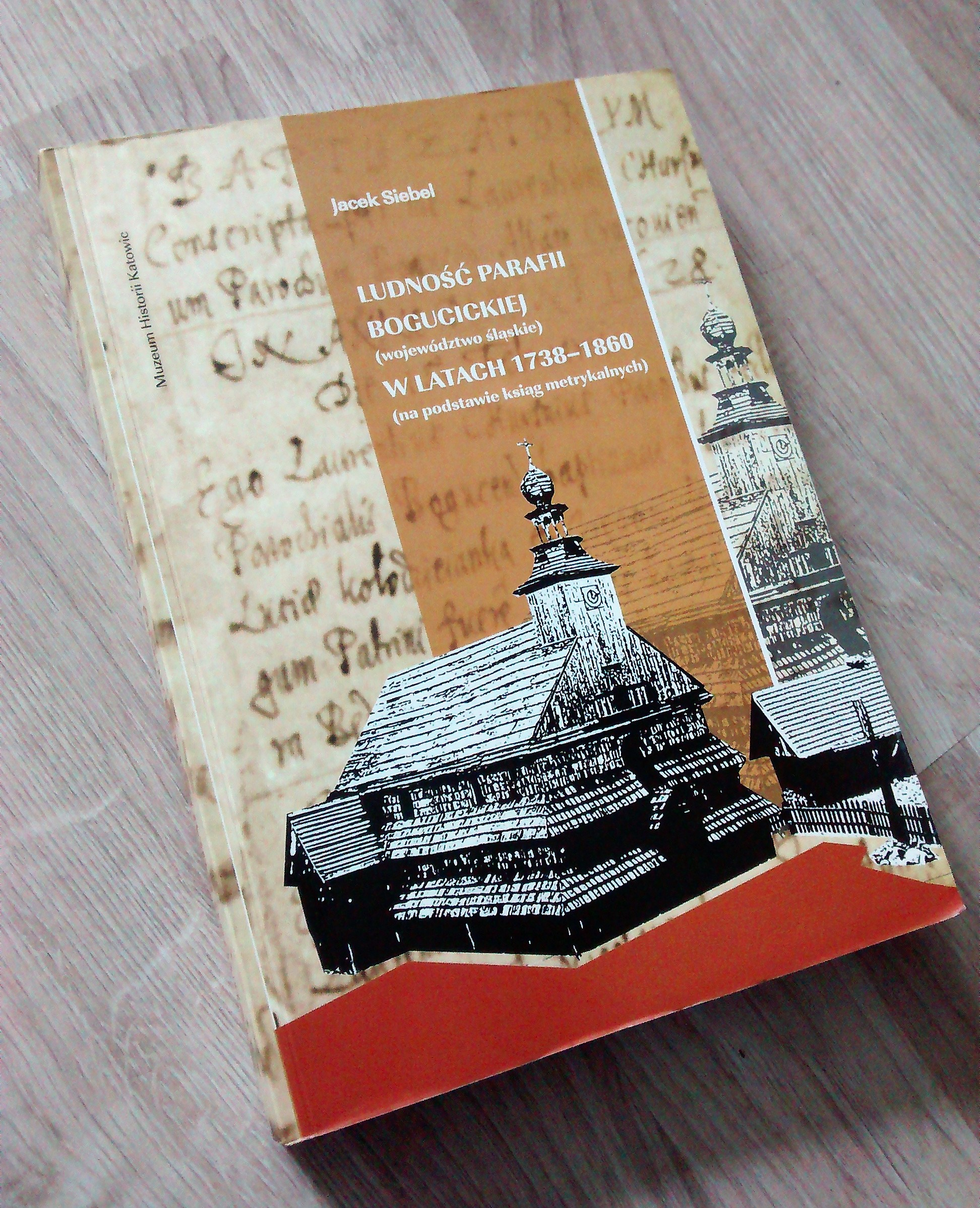 Książka pod tytułem "Ludność parafii bogucickiej (woj. śląskie) w latach 1738-1860 (na podstawie ksiąg metrykalnych)", autorstwa Jacka Siebla, wydana przez Muzeum Historii Katowic w 2012 roku